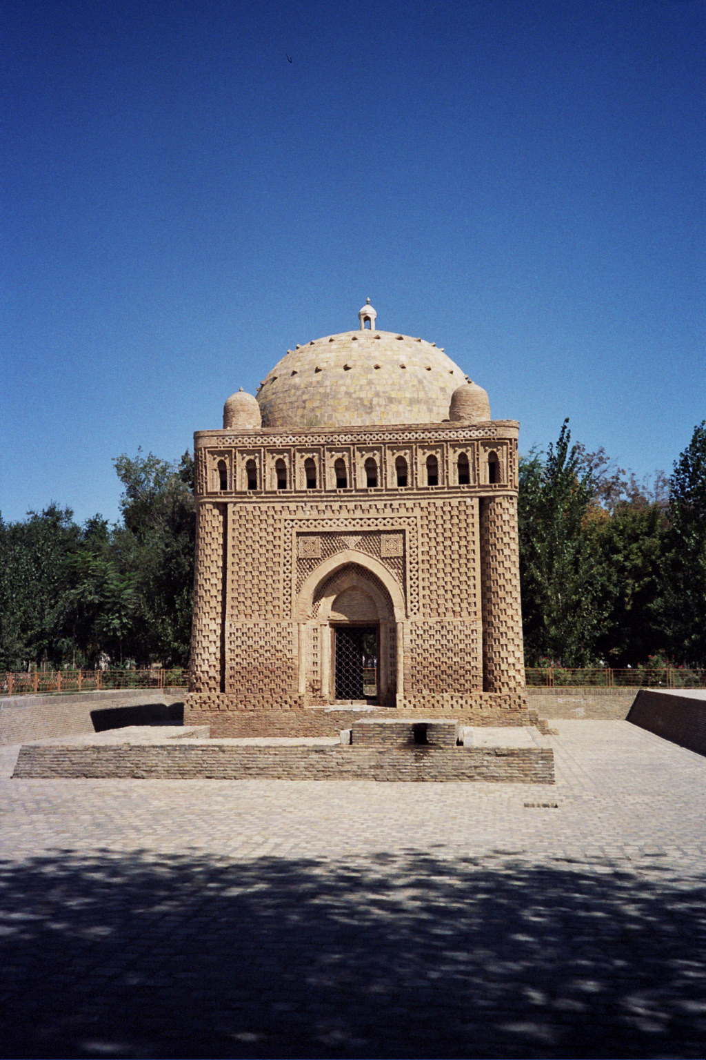 Samanid mausoleum in Bukhara